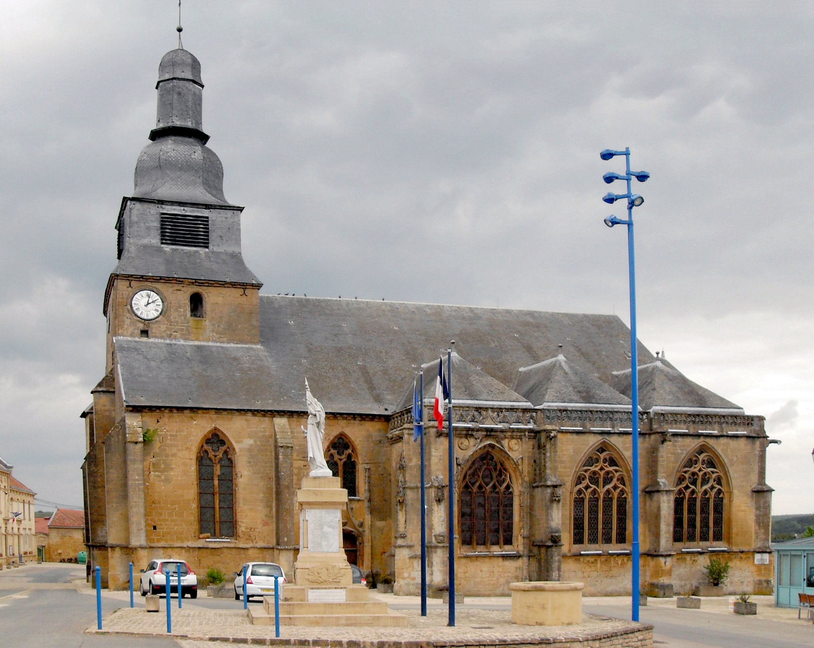 L'église Saint-Nicolas à Marville